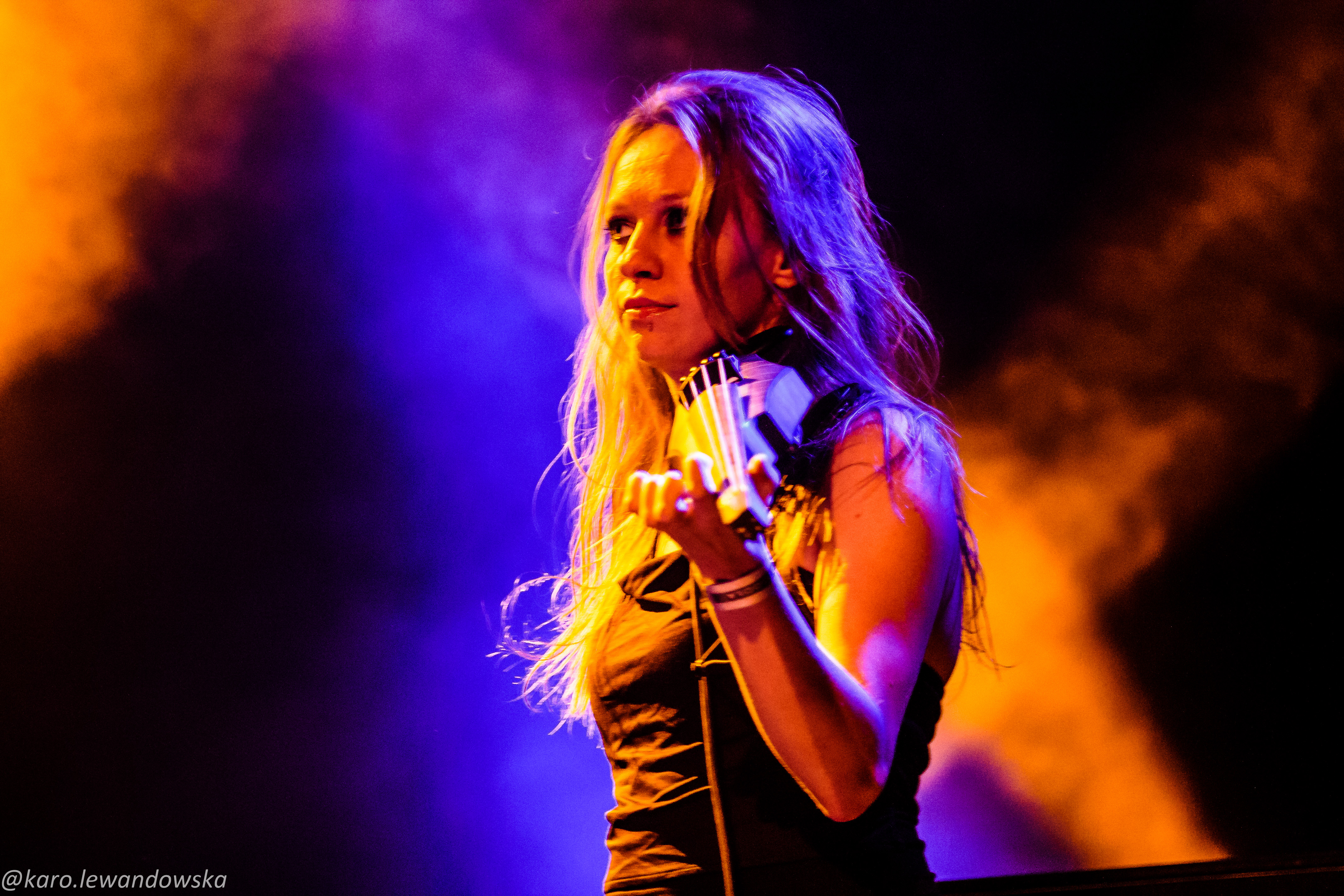 Małgorzata Krasowska fot. Karolina Lewandowska